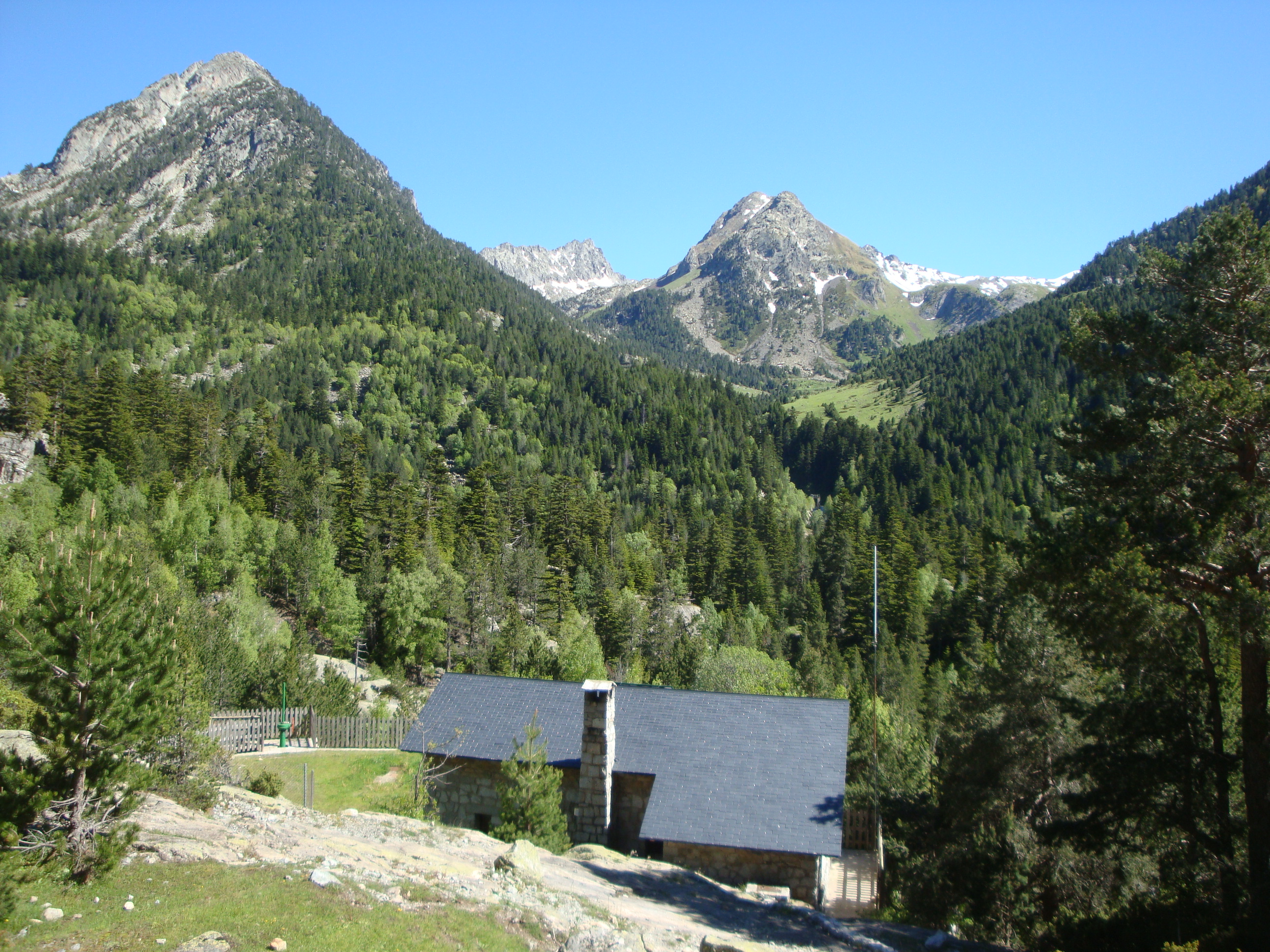 Parque Nacional Aiguestortes (LLeida) (España)